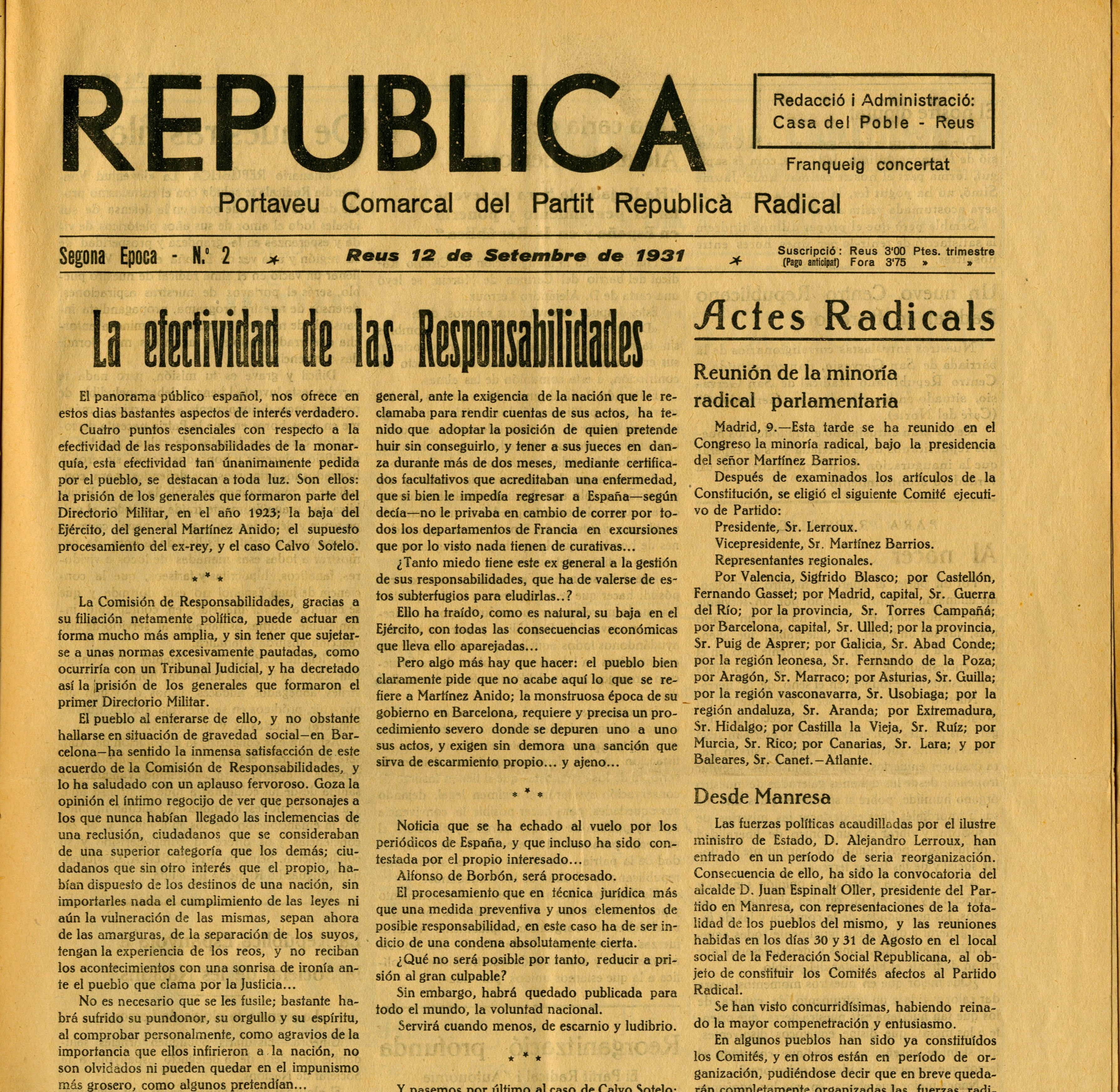 Primera pàgina del núm. 2 de República